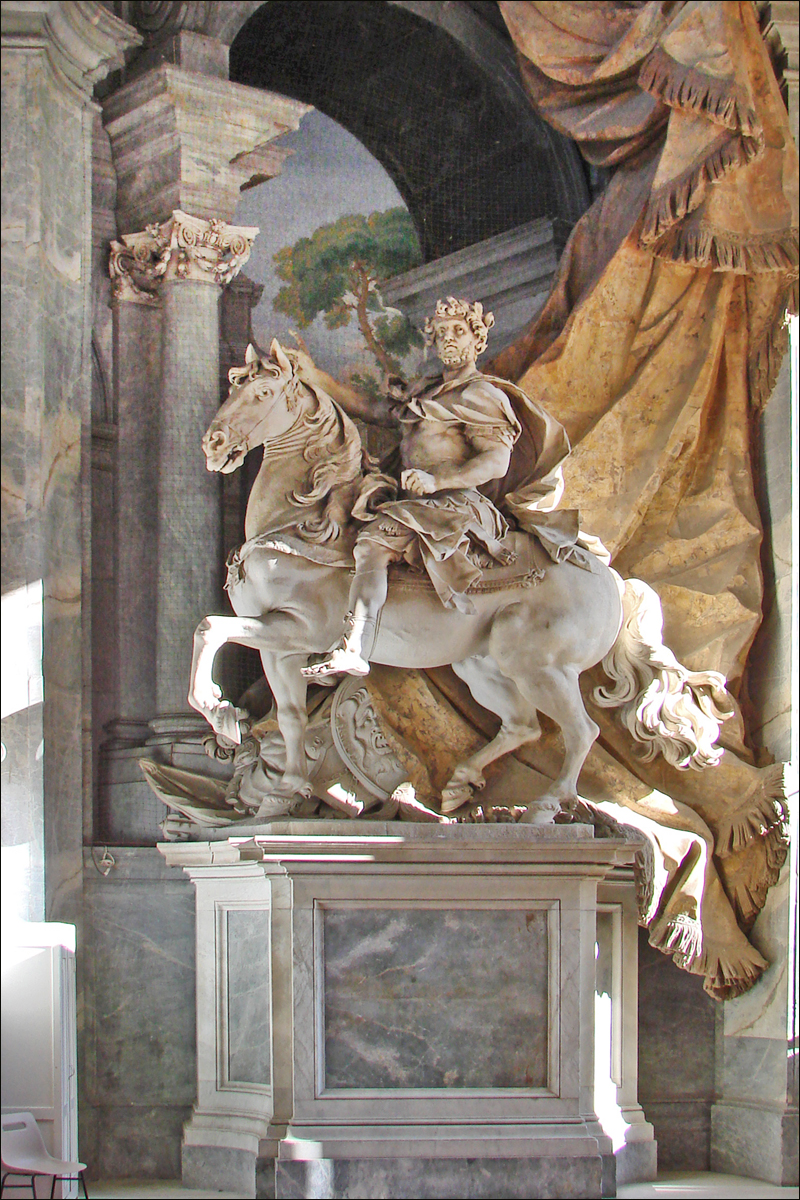 La statue équestre de Charlemagne sous le portique de Saint-Pierre Cette sculpture a été réalisée en 1725 par Agostino Cornacchini Cette statue est située à l'extrémité gauche du portique de la basilique Saint-Pierre.